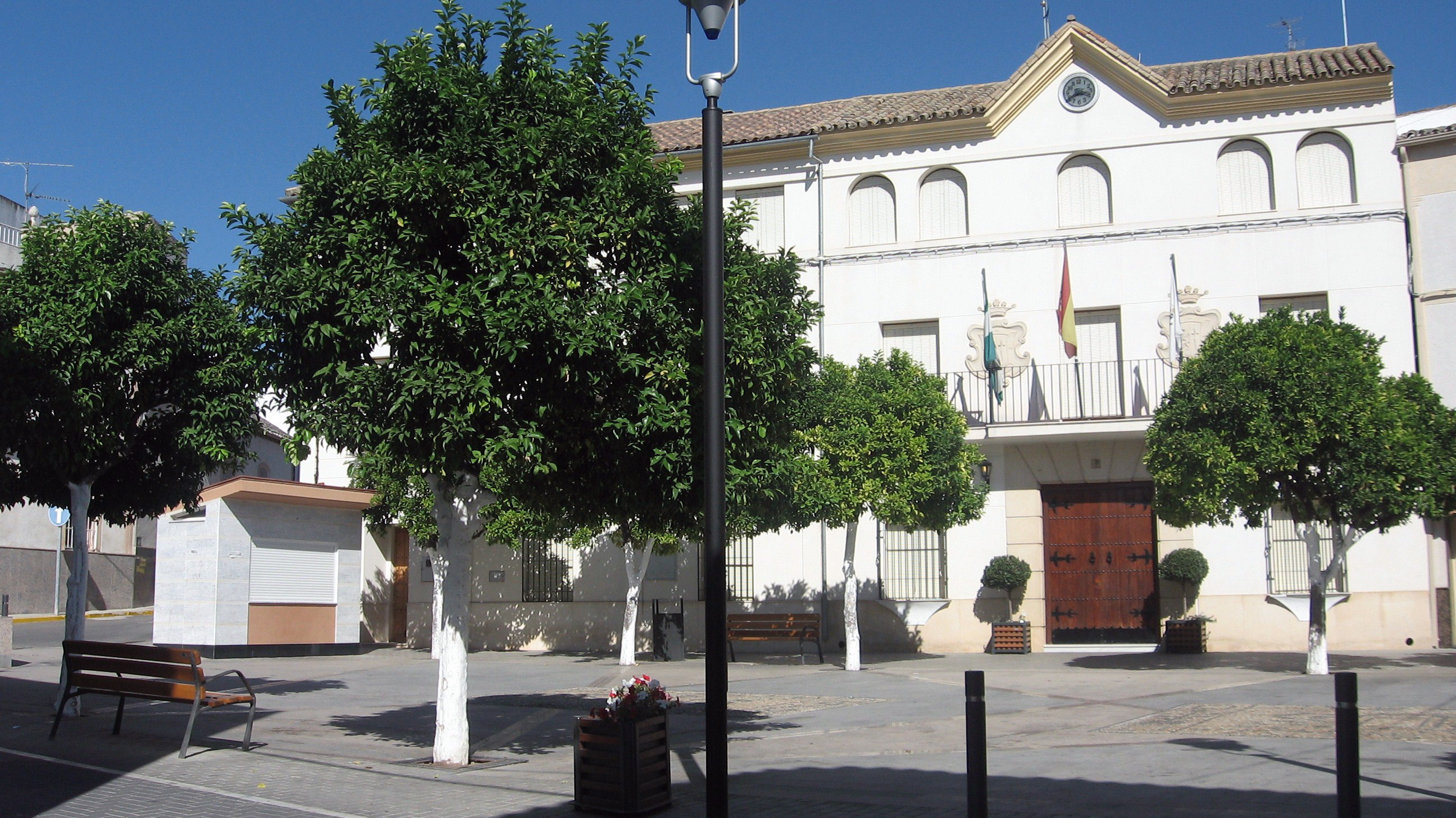 Ayuntamiento de la población de Monturque en Córdoba Spain